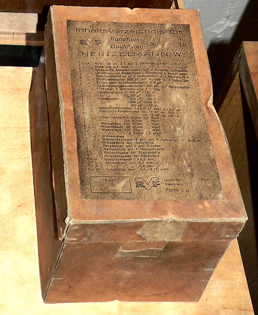 GLAM im Deutschen Museum Bonn, Verkaufskarton mit Bauteileliste des Heinzelmannradios